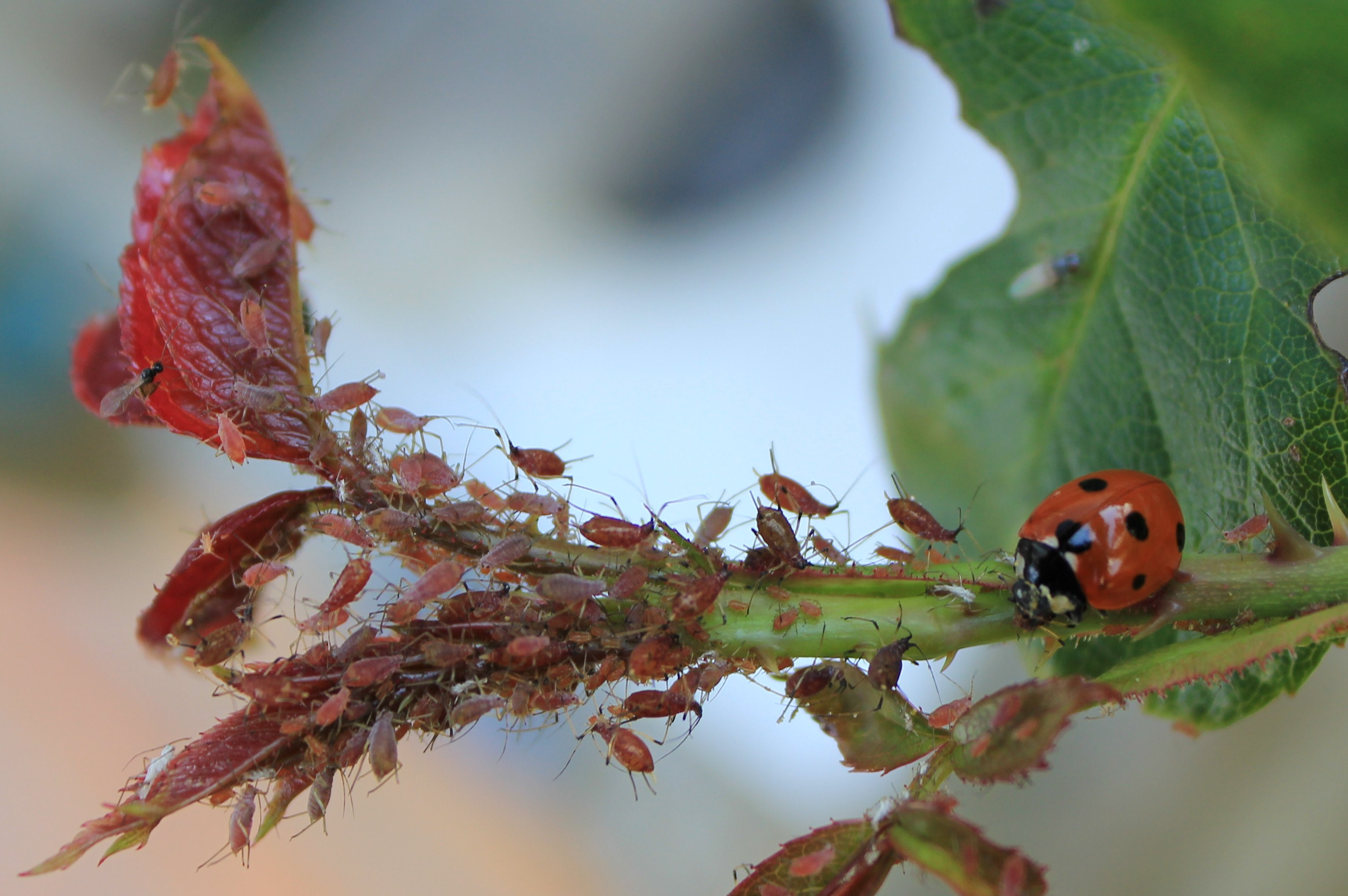 Coccinelle ayant isolé des pucerons au bout de feuilles de rosiers, et s’apprêtant à en manger